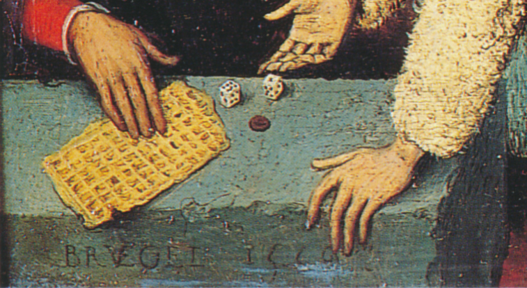 BRVEGEL (V und E ligiert) 1559. Signatur des Gemäldes Kampf zwischen Karneval und Fasten